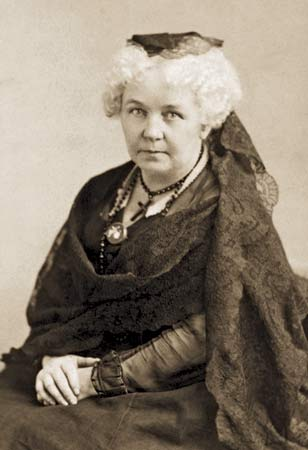 Elizabeth Cady Stanton (1815-1902)